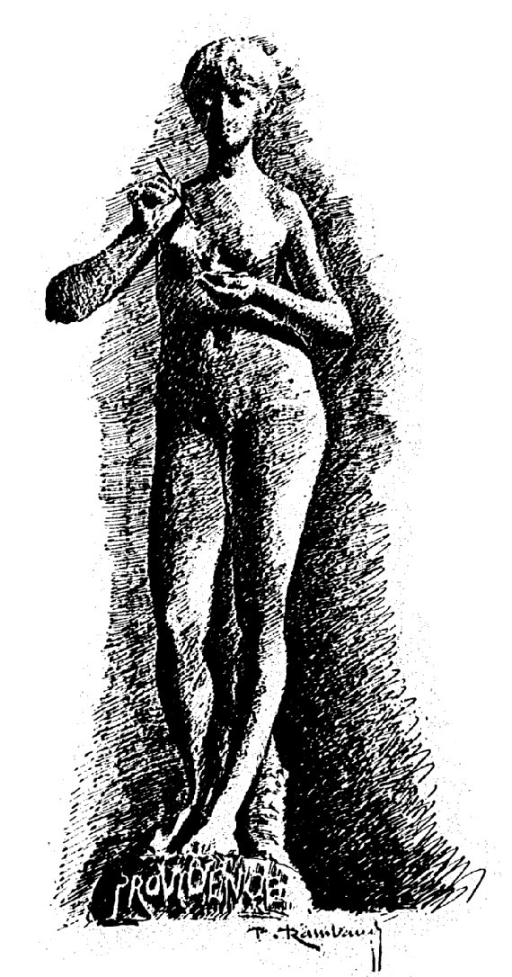 La Providence